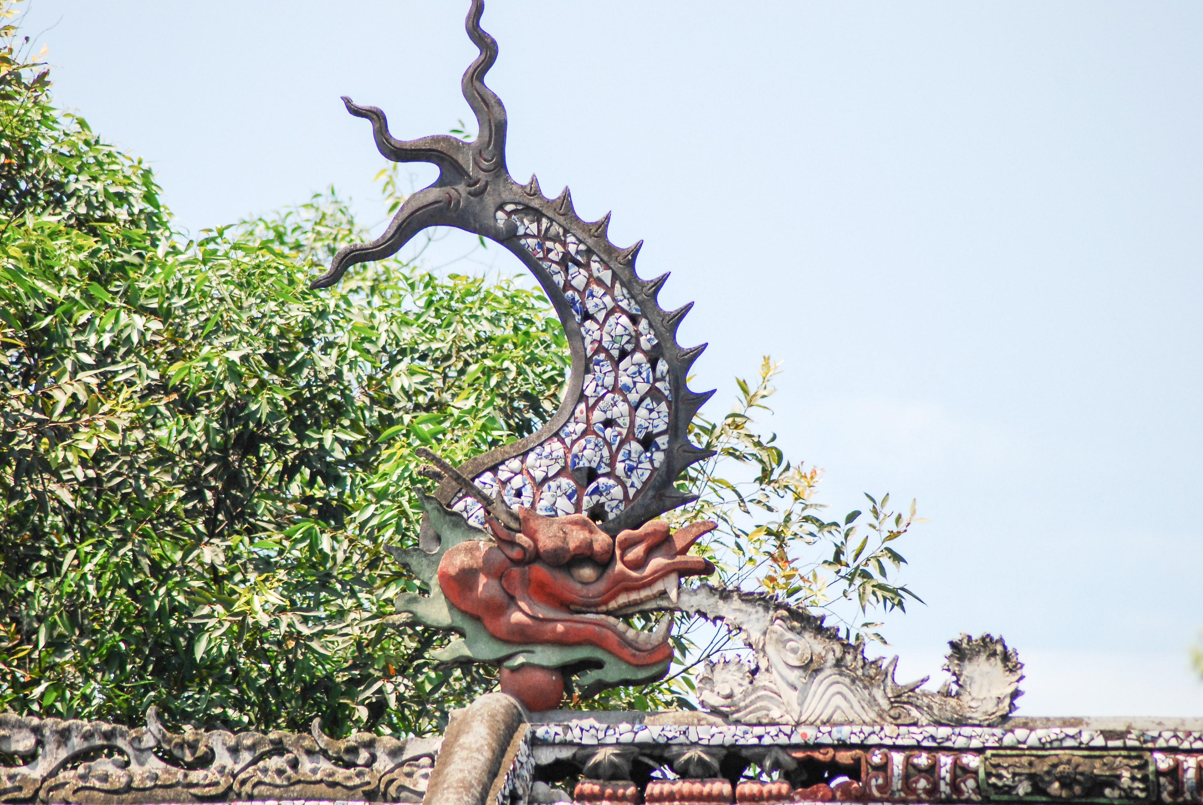 中文（中国大陆）: 成都昭觉寺 屋顶雕塑